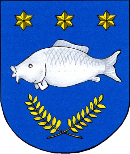 znak, Vatín, okres Žďár nad Sázavou